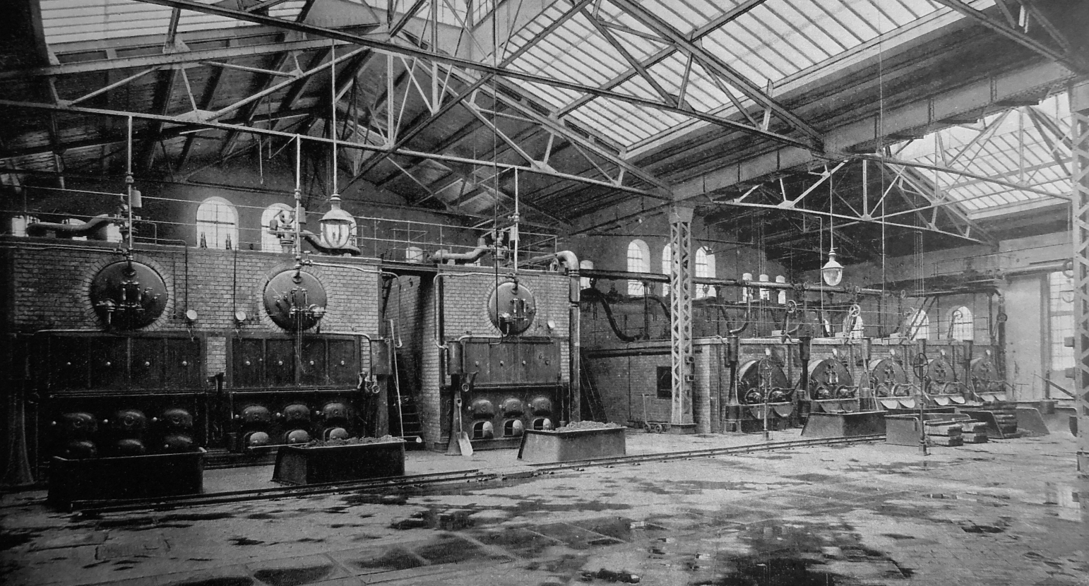 Gasometer Simmering: Figur 32. Kesselhaus